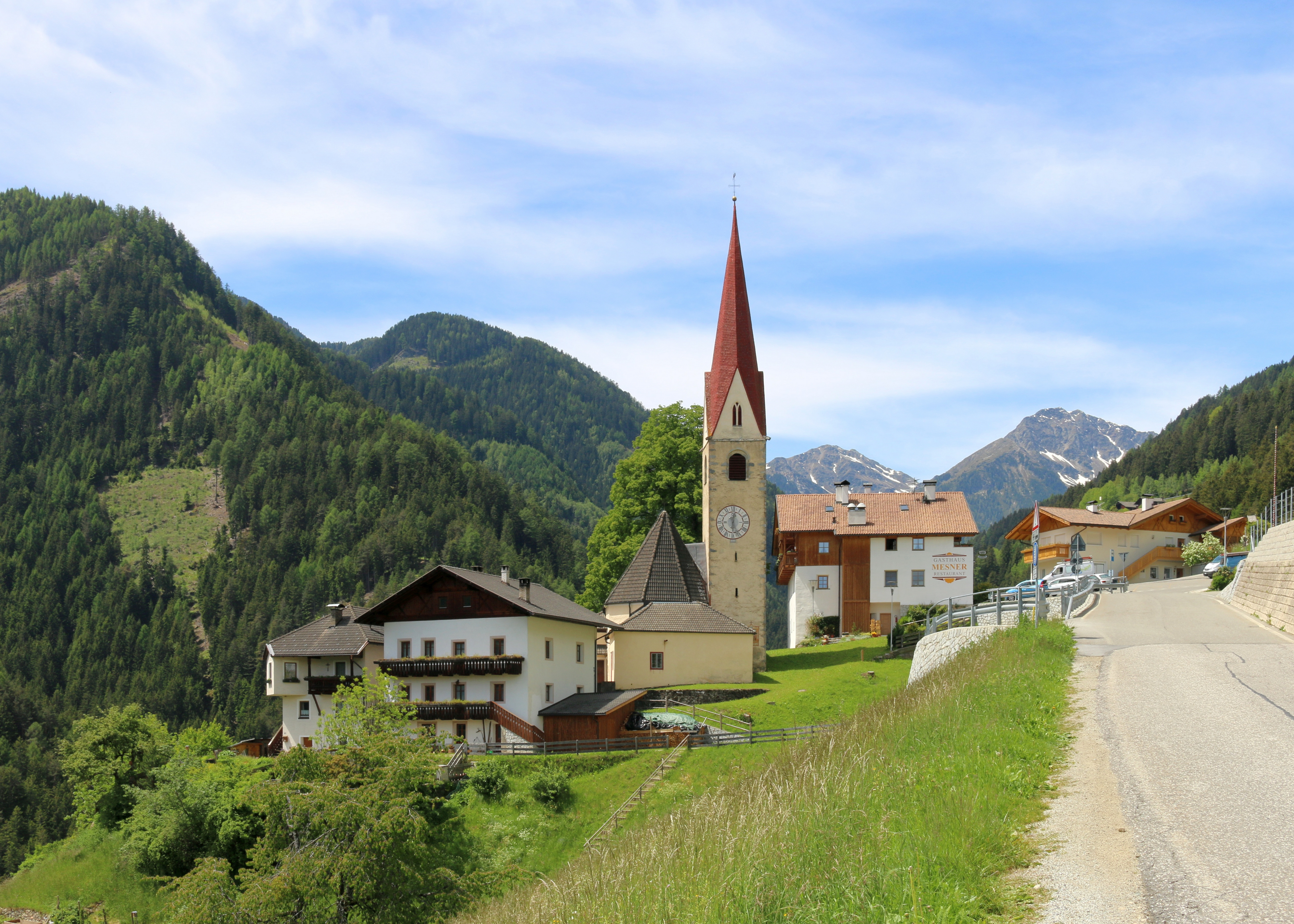 Vahrn, Südtirol: Siedlung Schalders